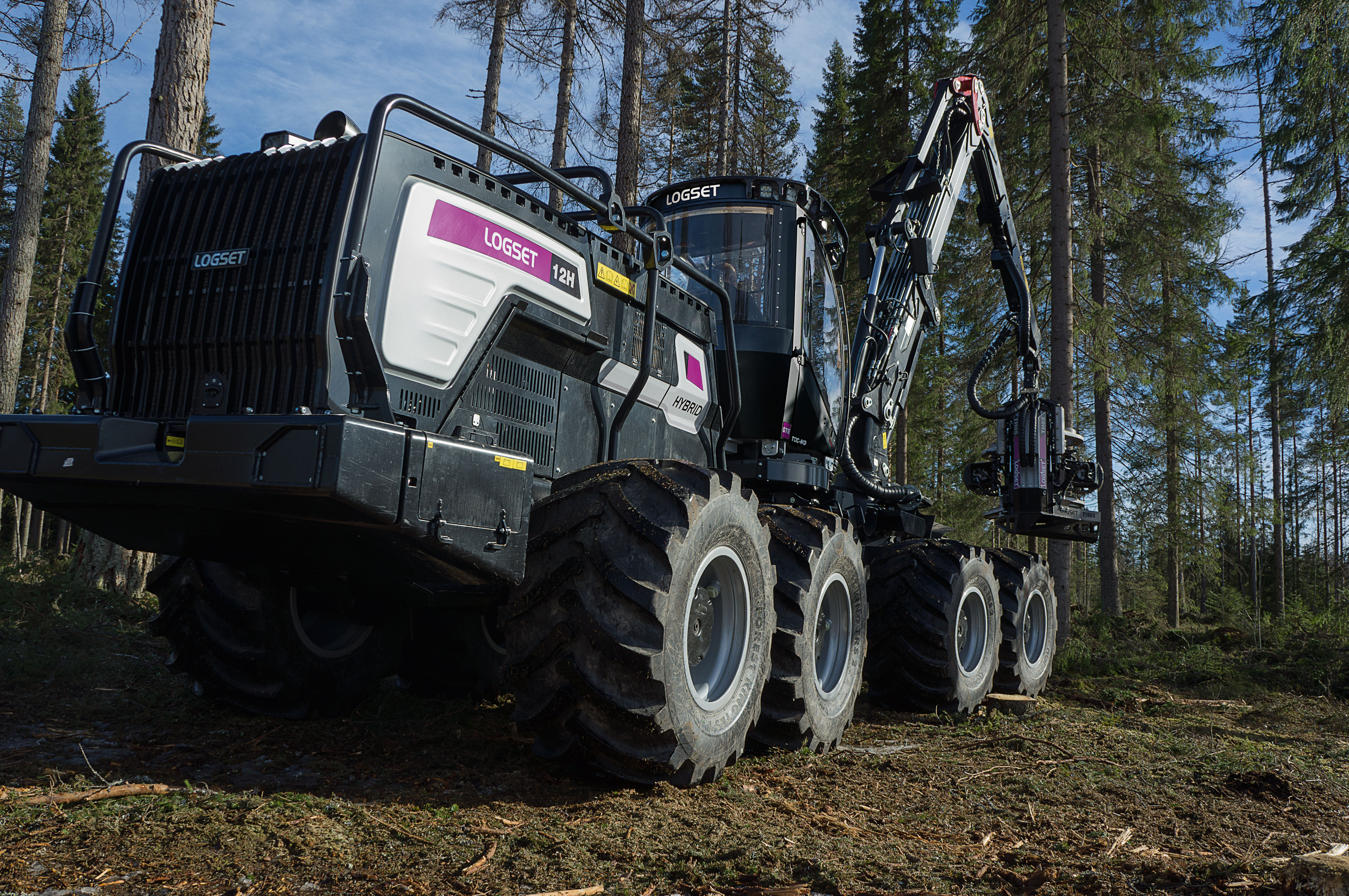 Logset 12H GTE Hybrid harvesteri Suomessa.